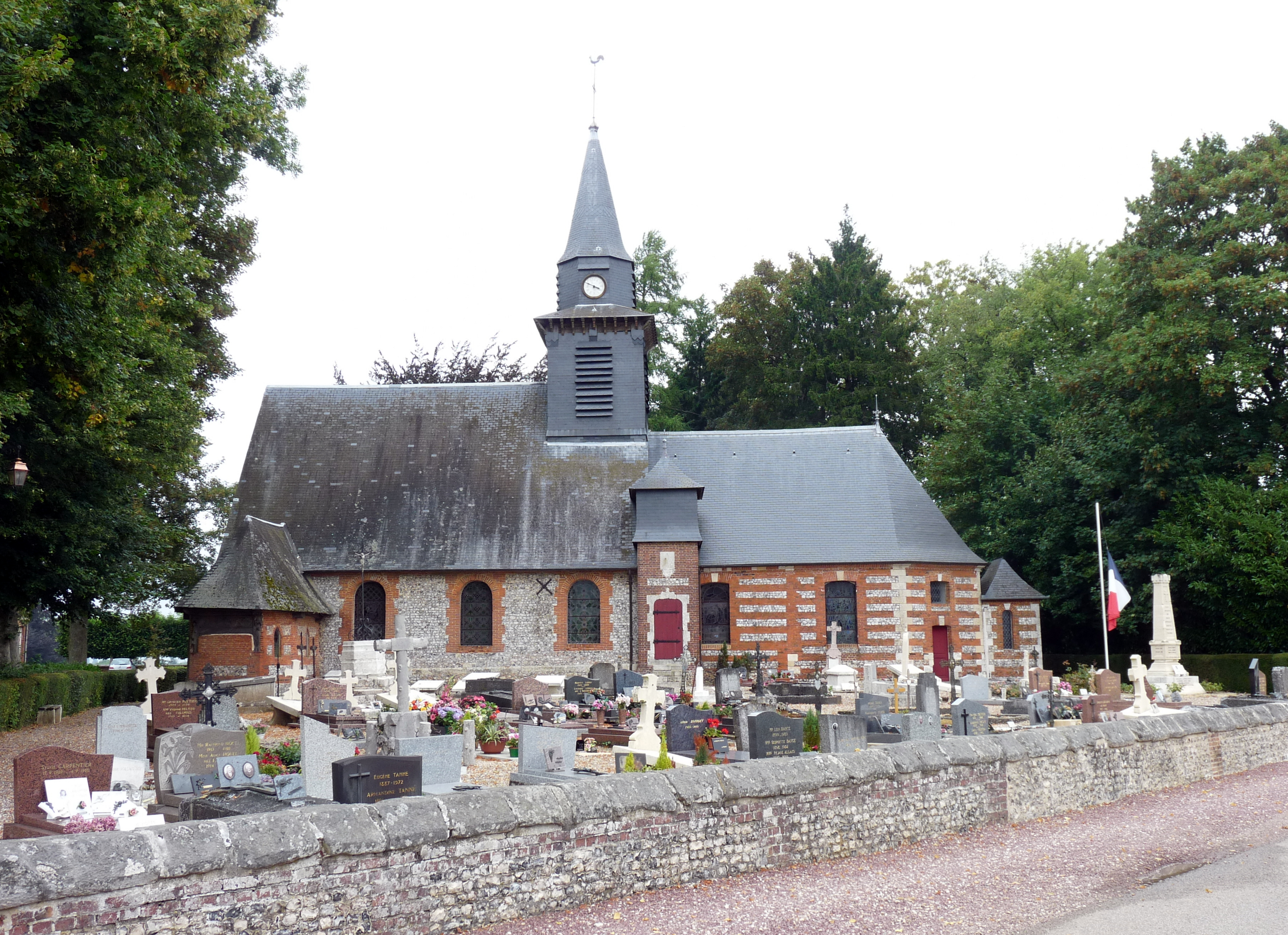 Église Notre-Dame de Bois-Héroult (Inscrit) .